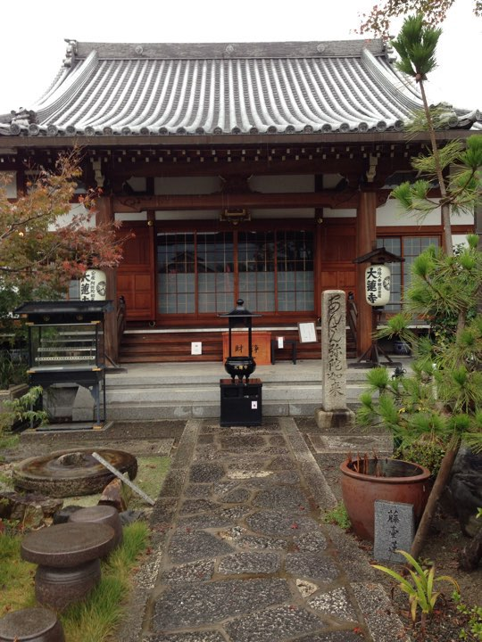 引接山大蓮寺